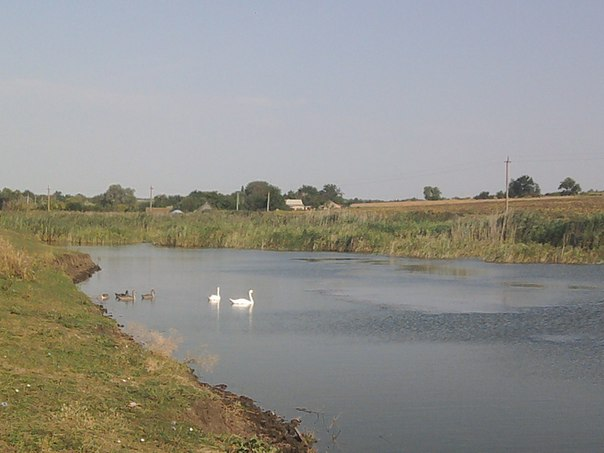 Лебеді на ставку поблизу села Червона Слобода